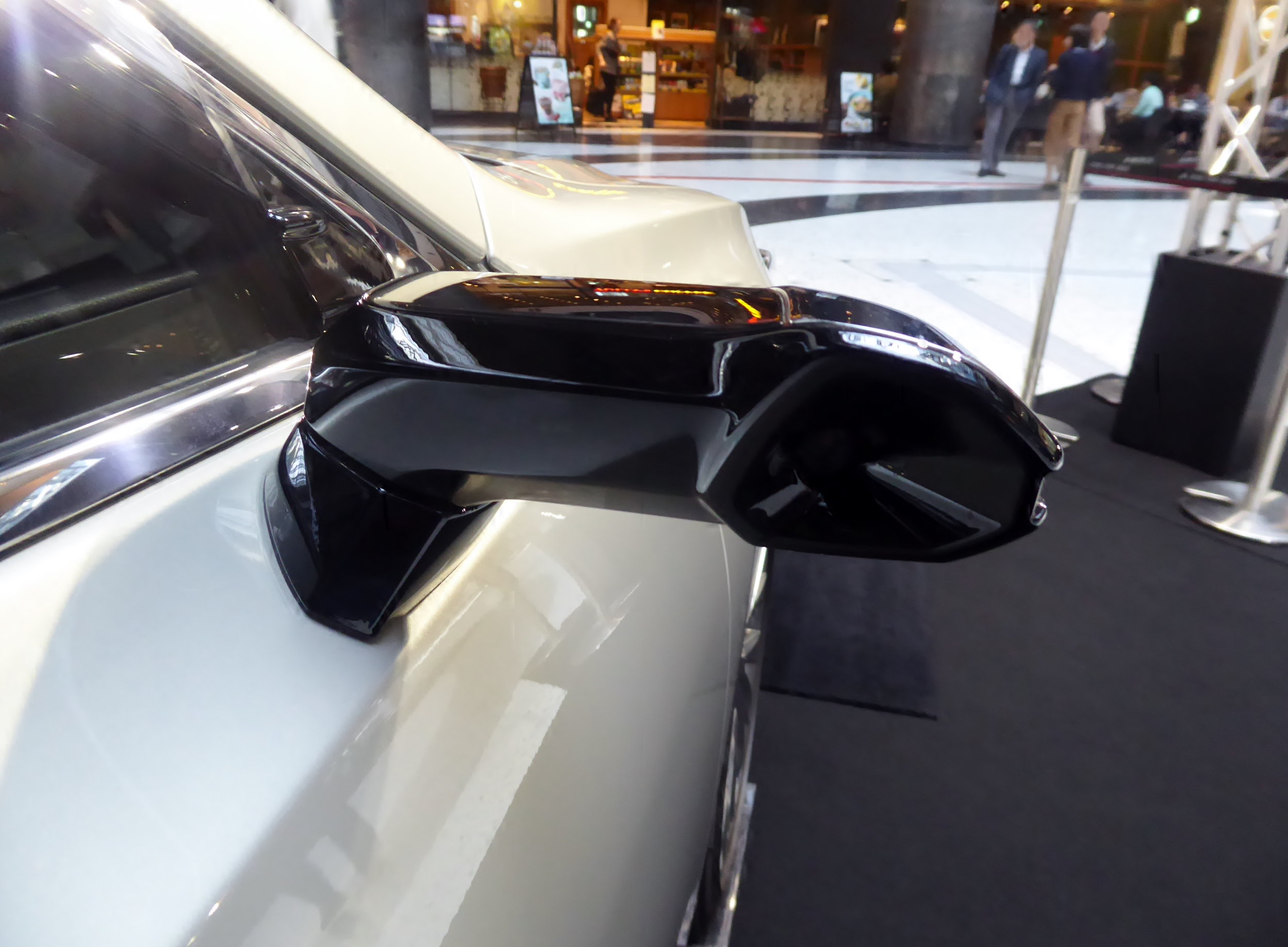 6AA-AXZH10-AEXGB型レクサス・ES300h"version L"のデジタルアウターミラーを撮影。